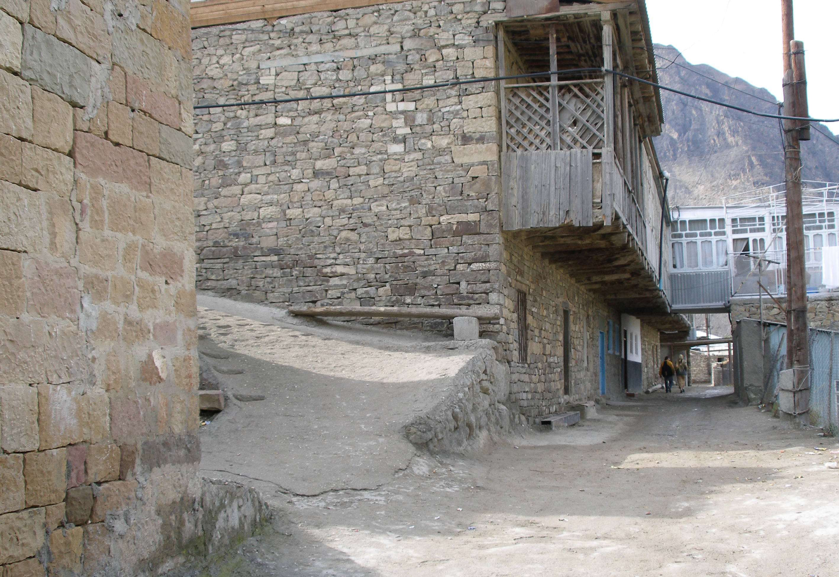 Гимры. Дом в котором жил аварский аоэт и писатель Гамзат Цадаса